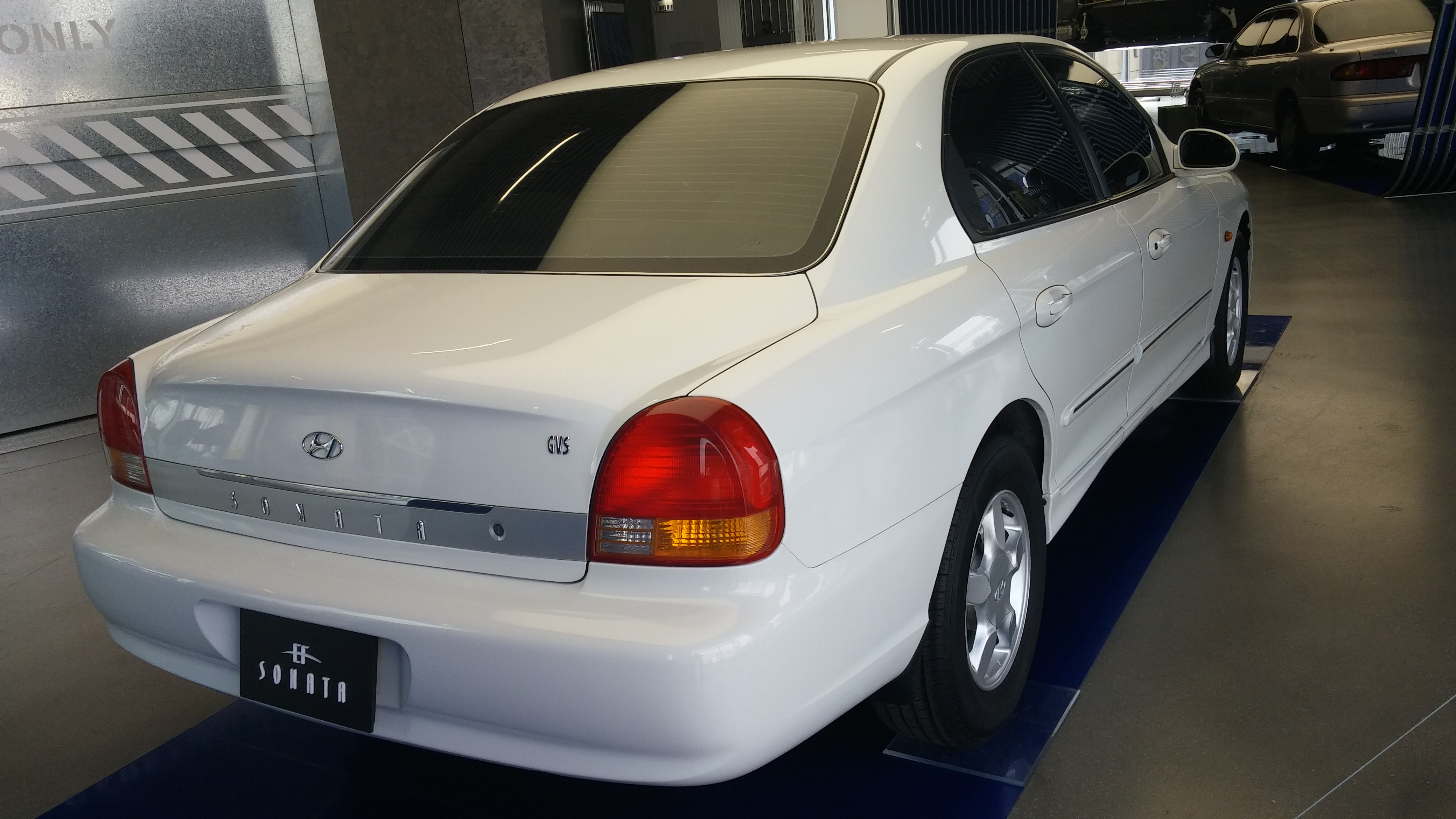 현대 EF쏘나타 후측면